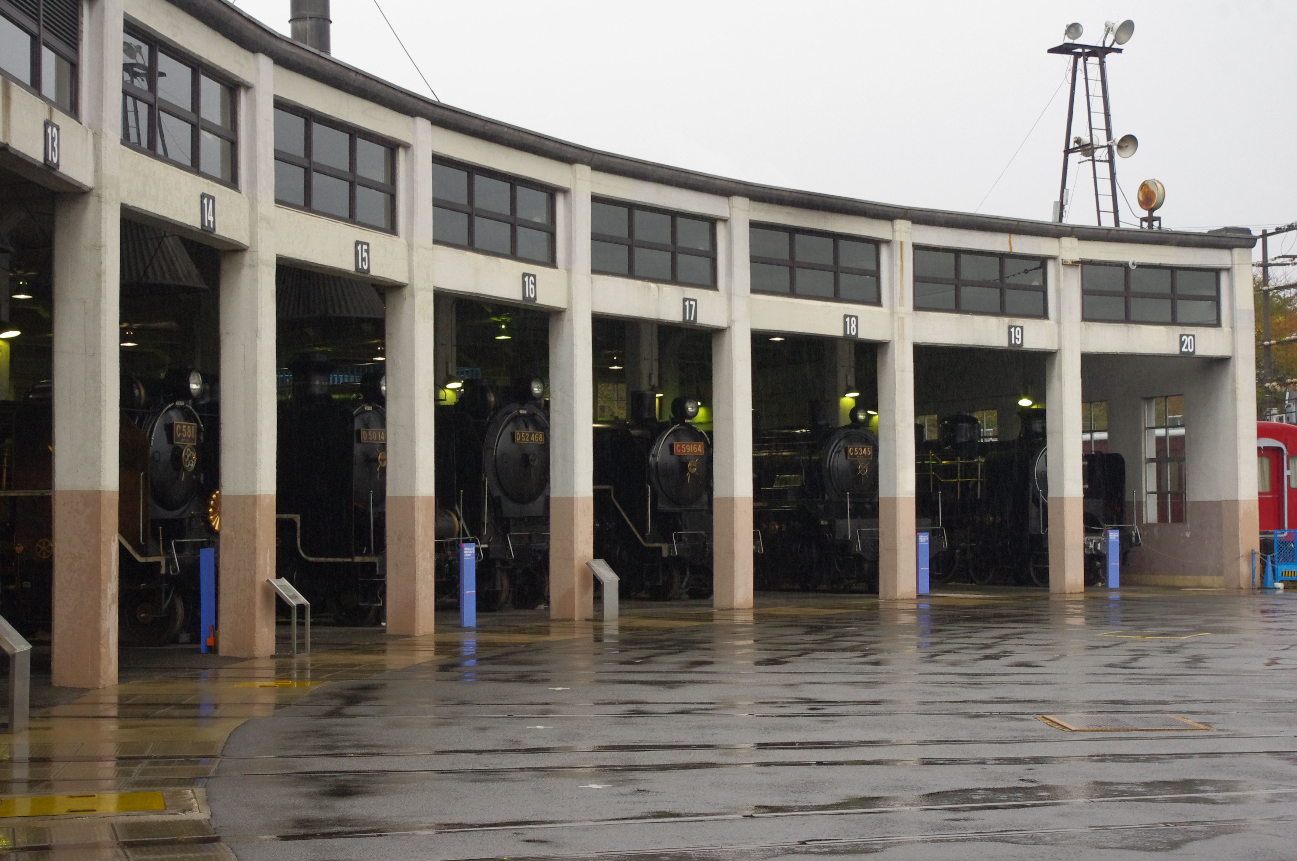 Umekoji Steam Locomotive Museum / 梅小路蒸気機関車館